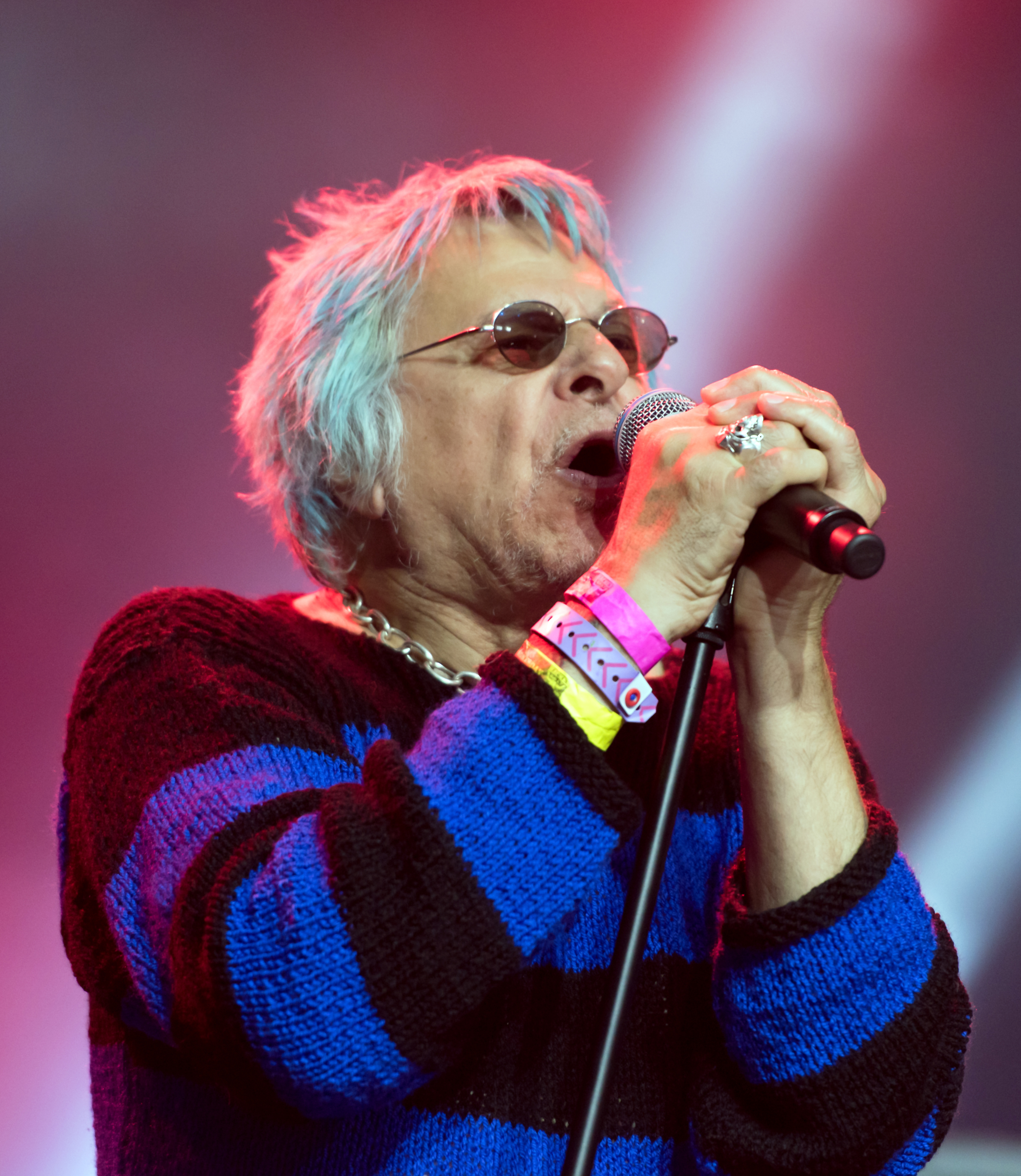 UK Subs beim Wacken Open Air 2017